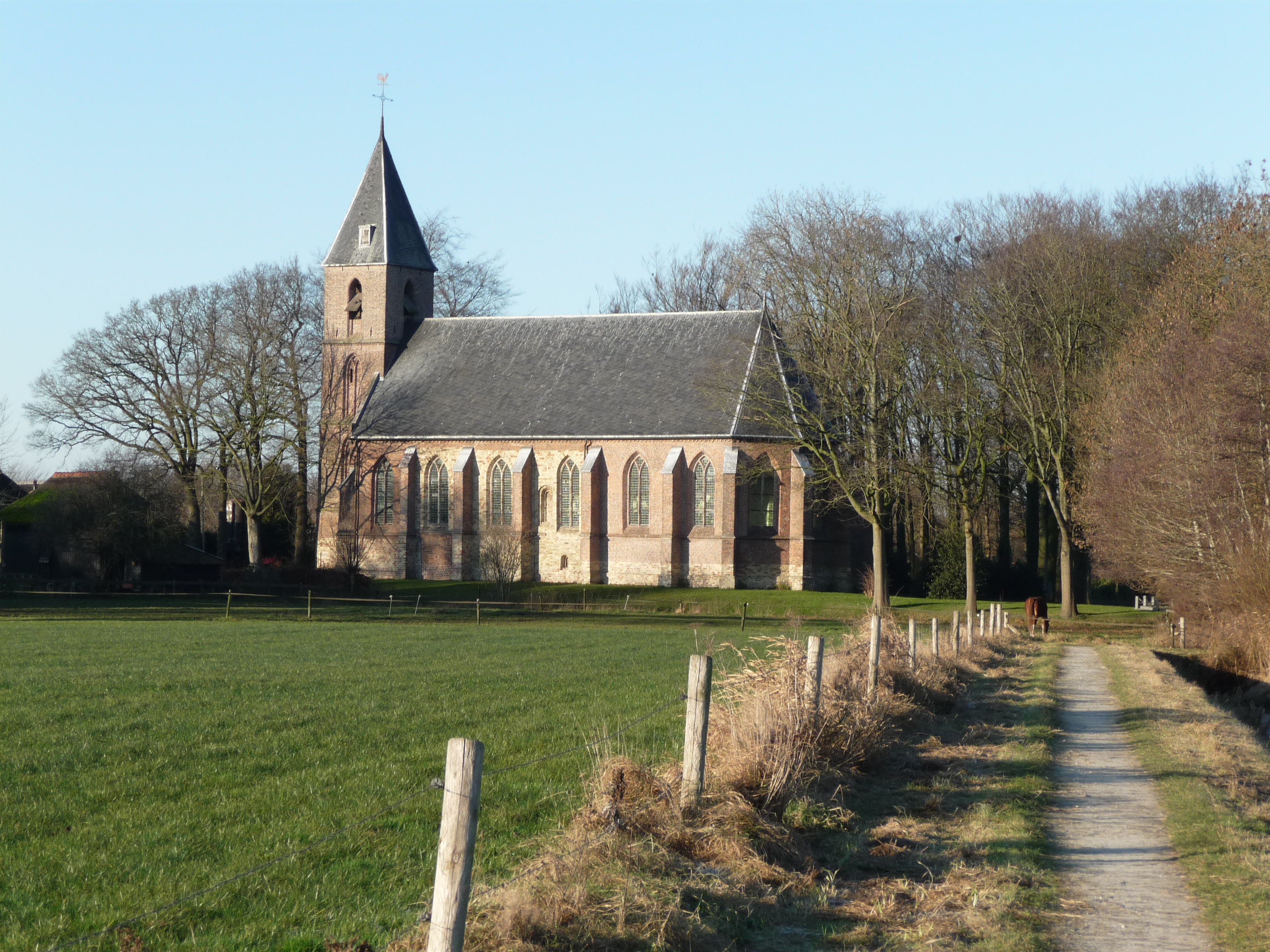 De Hervormde Kerk te Blijdenstein. (Ruinerwold)